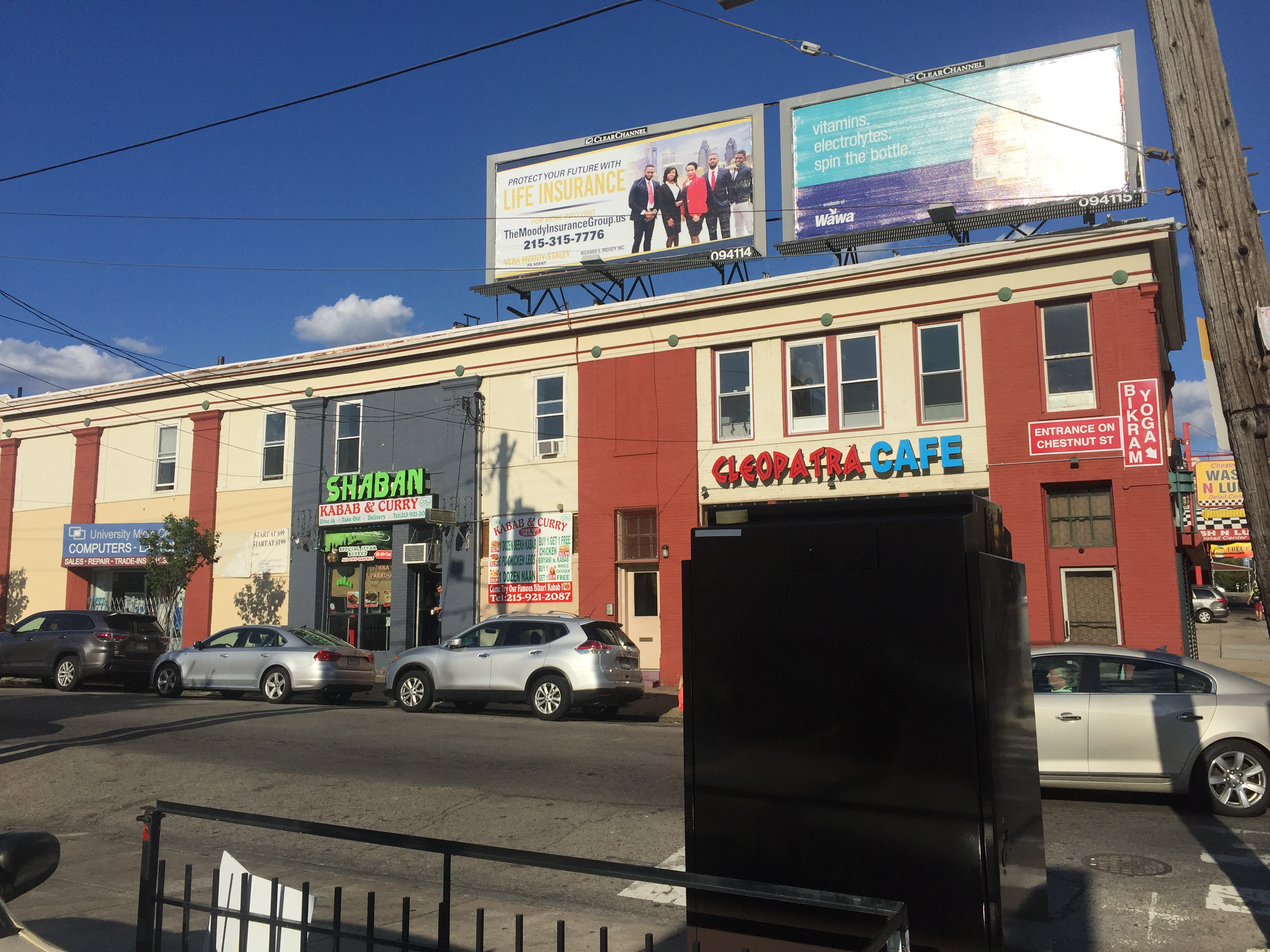 Spruce hill restaurants